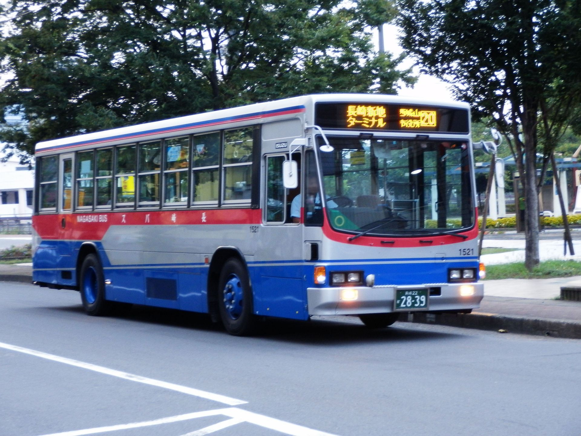 長崎バス下大橋バス停